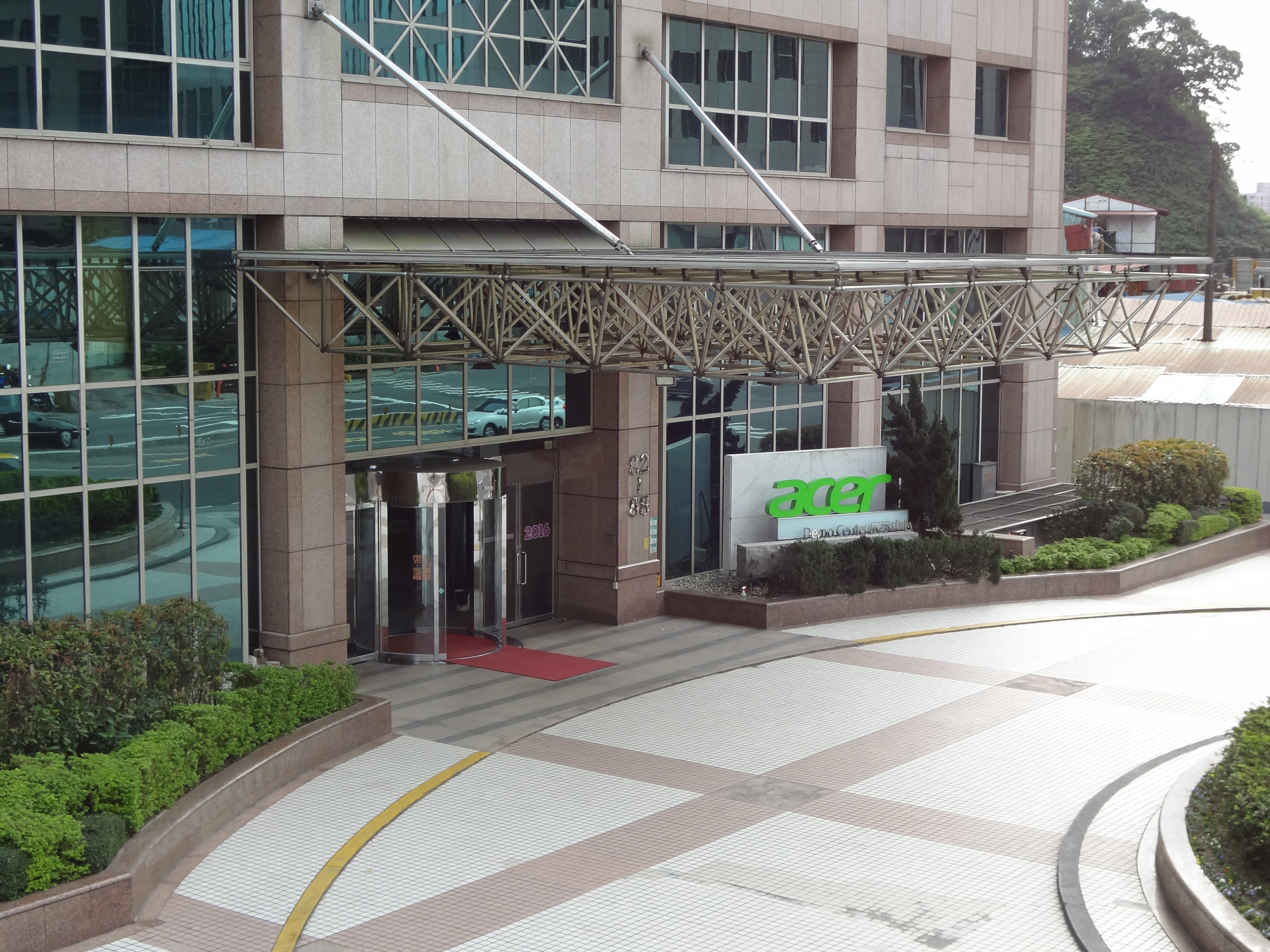 中文（台灣）: 從人行天橋上俯瞰東方科學園區宏碁大樓大門。